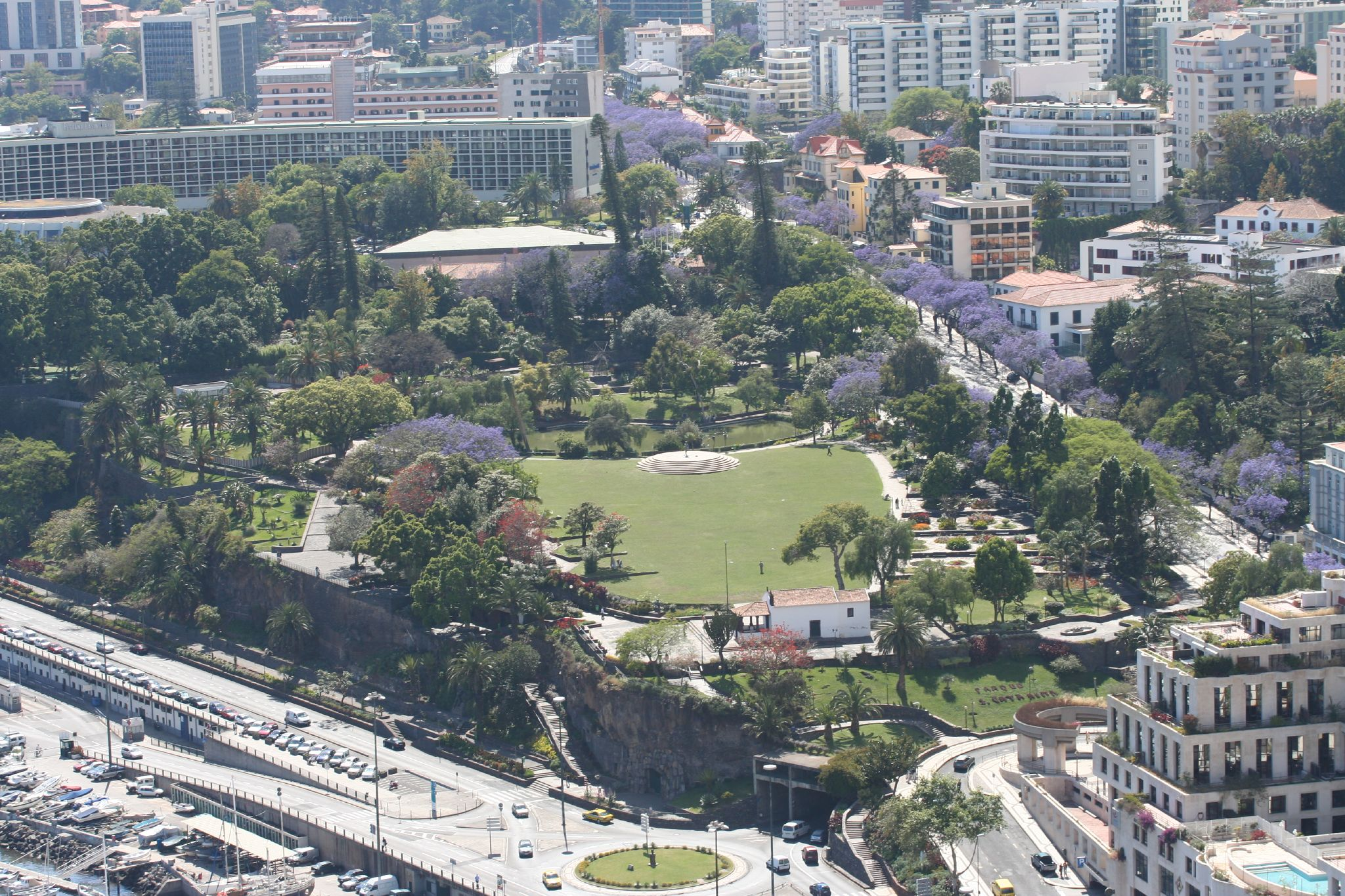 Funchal